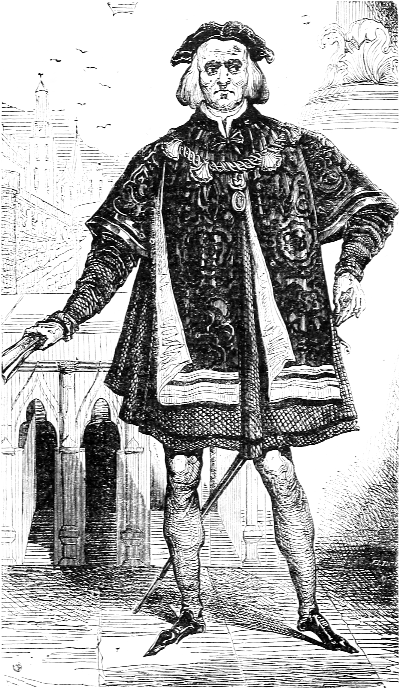 Olivier le Daim sur une illustration pour l’article Physiognomonie dans le Dictionnaire infernal par Collin de Plancy.